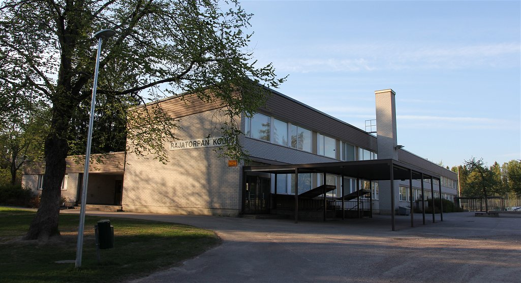 Rajatorpan koulu on Vantaan Myyrmäen suuralueen Vapaalan kaupunginosassa] sijaitseva, vuonna 1945 kansakouluna toimintansa aloittanut suomenkielinen peruskoulun alakoulu (luokka-asteet 1–6). Ensimmäinen koulurakennus (Ilpolan koulu) valmistui syksyllä 1948 ja kuvan uudempi rakennus marraskuussa 1964. Koulun katuosoite on Nuijatie 12.